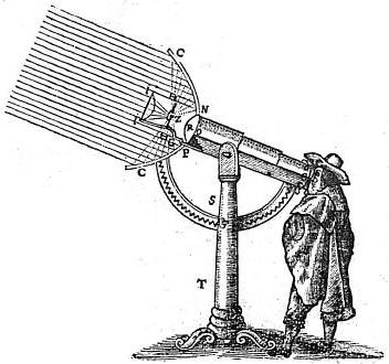 Schéma d'une lunette destinée à « voir les objets proches et accessibles le plus distinctement qu’il se peut » et dont le principe dérive de celui de la lunette astronomique. Traité de dioptrique, pp 131-132. Gallica - BNF